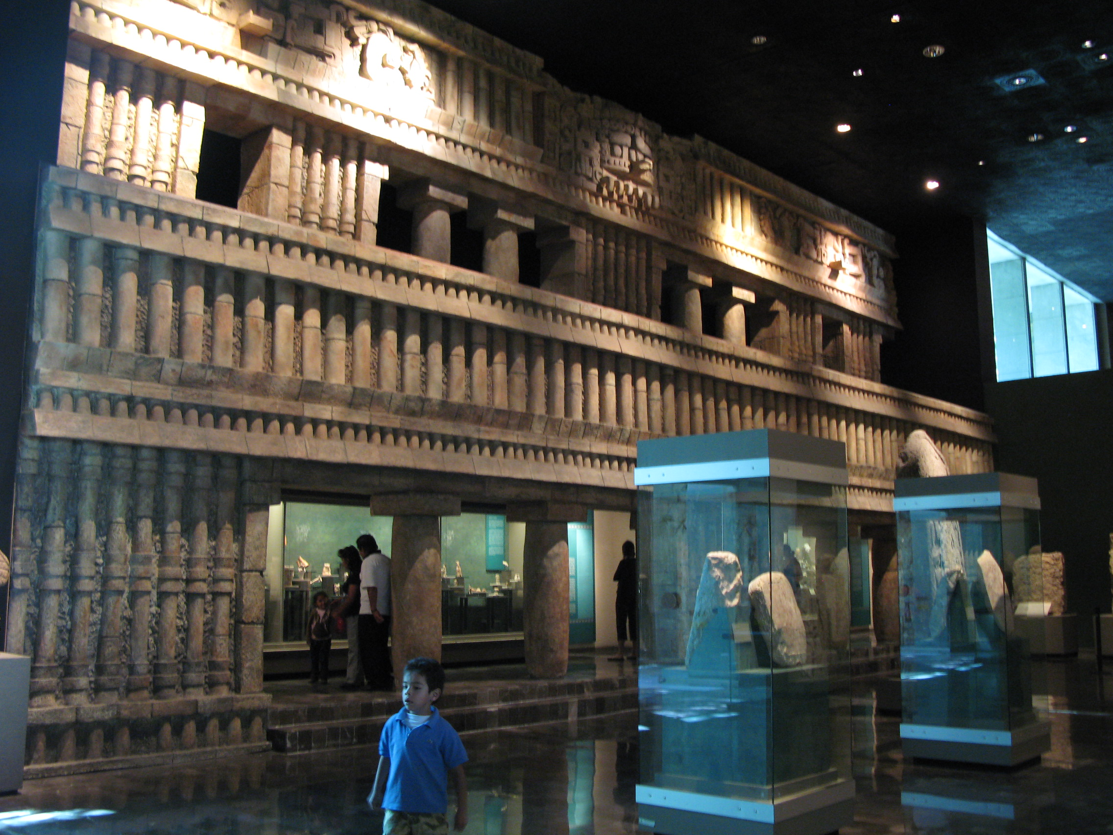 V Antropološkem muzeju v Cuidad de Mexico je prikazana zgodovina naseljevanja Mezoamerike.